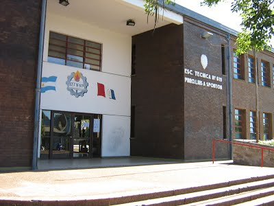 Escuela de Educación Técnica N° 619 Presbítero Luis Sponton, Villa Ocampo.